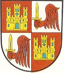 Escudo del infante Alfonso de Castilla, hijo de Sancho IV el Bravo, rey de Castilla y León.